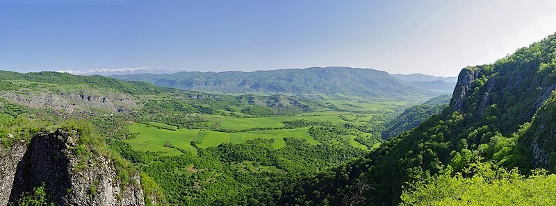 Колатак